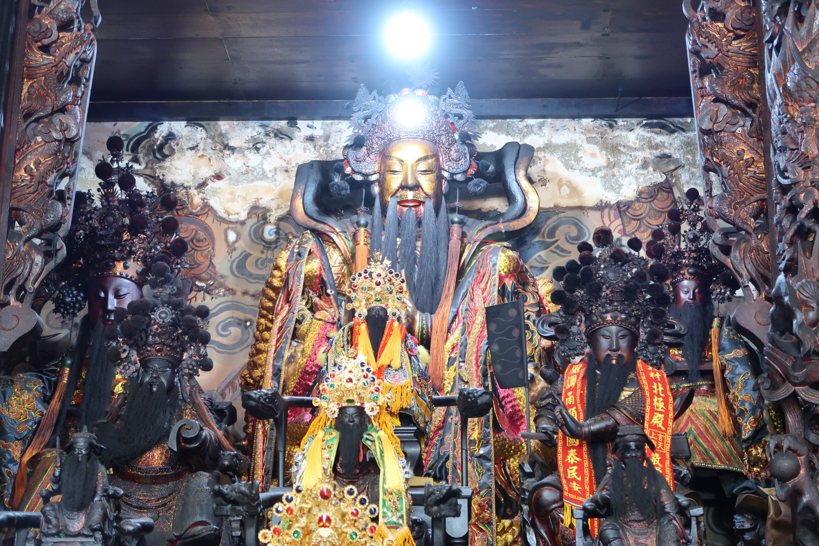 台灣湖西鄉西溪村廟宇，主祀玄天上帝。